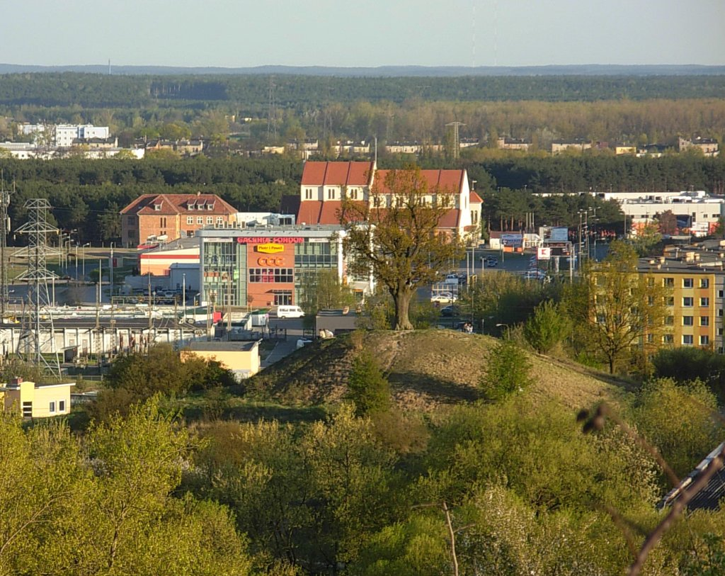 Widok ze Zbocza Fordońskiego w Bydgoszczy. W tle dąb Napoleona